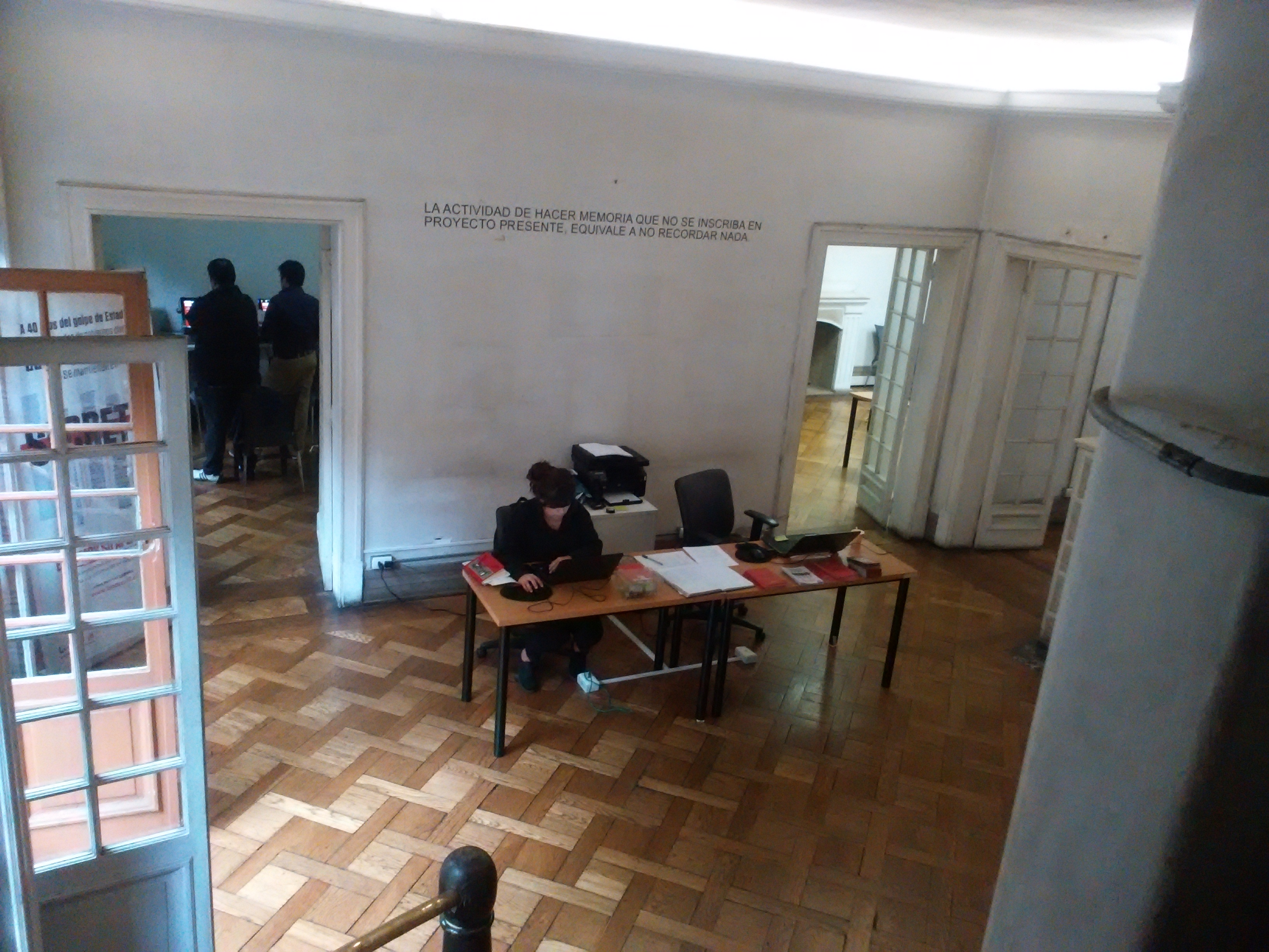 Museo Londres 38 en Santiago, lugar donde las fuerzas represivas del general Pinochet durante la dictadura